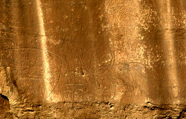 Gravures préhistoriques de la région d'El Bayadh, Algérie